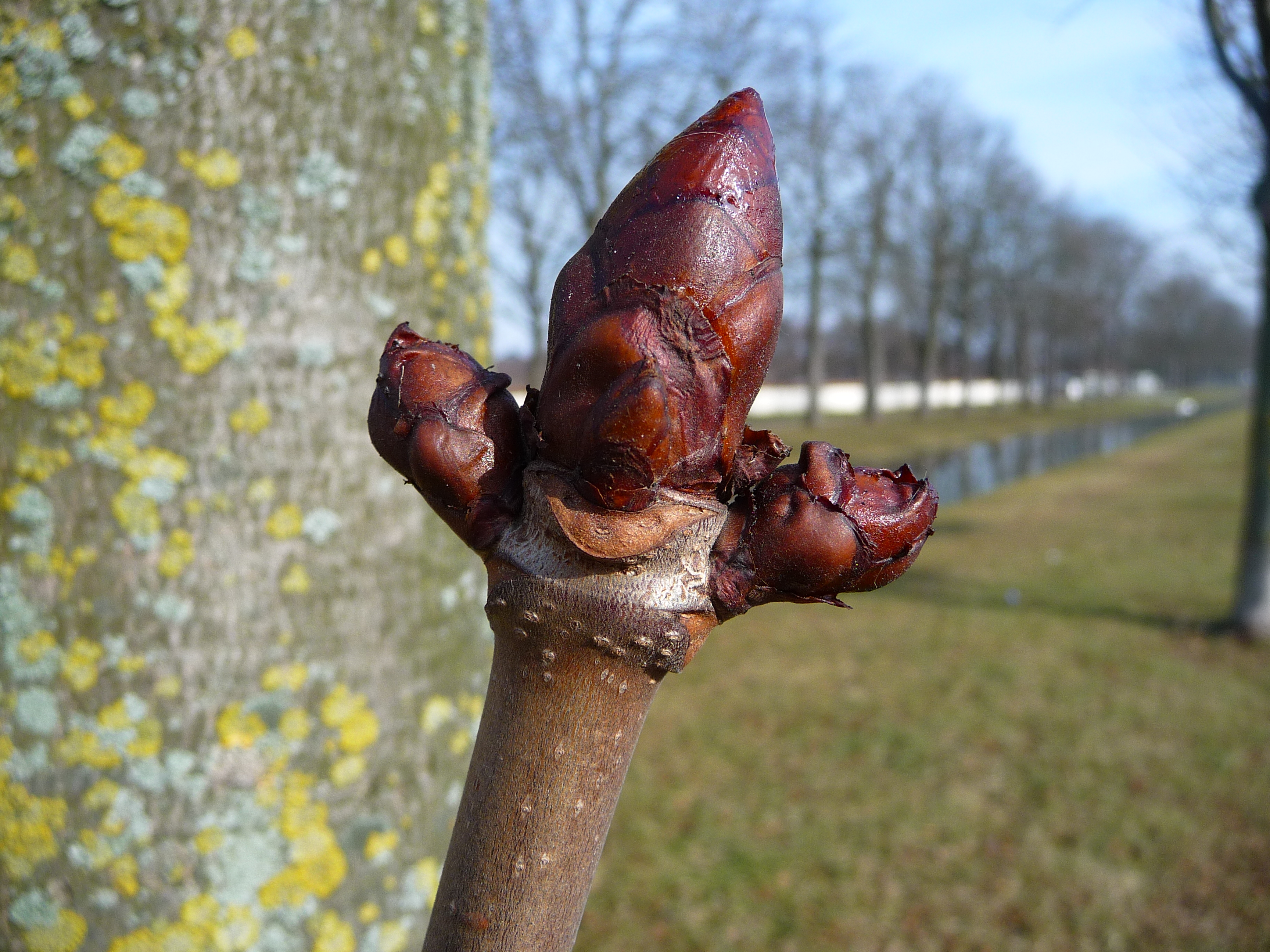 Knospe an einer Echten Rosskastanie im Februar